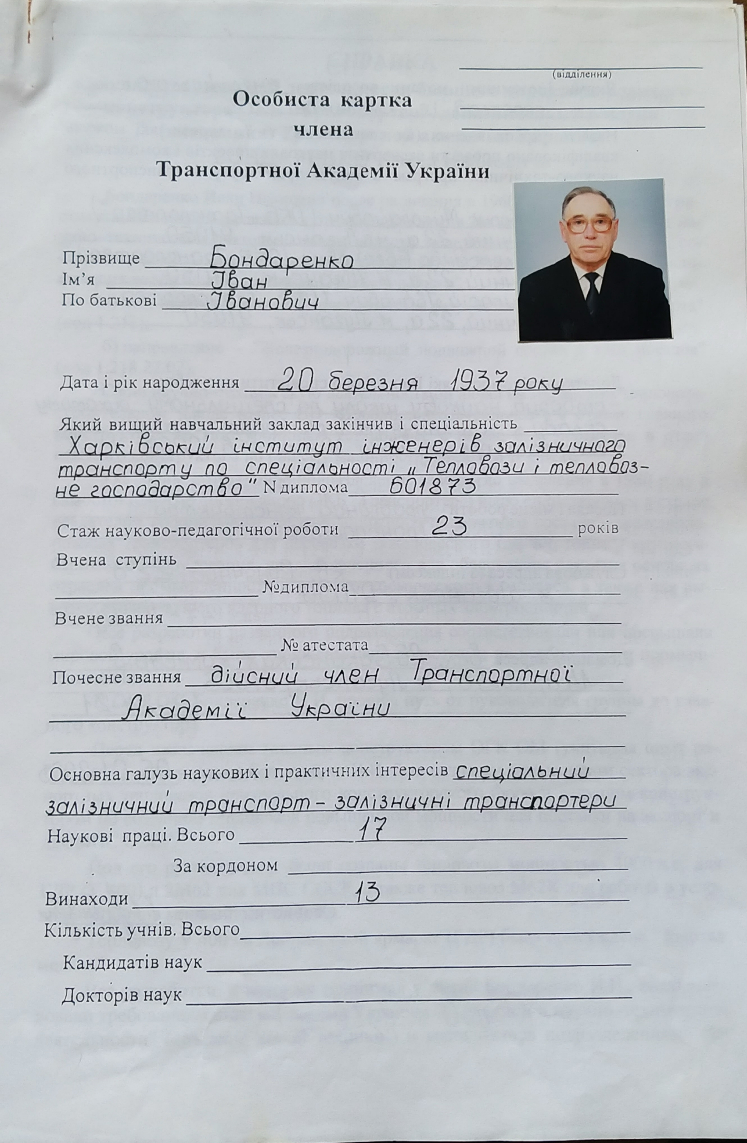 Перша сторінка особистої картки члена Транспортної академії України Бондаренко І.І.